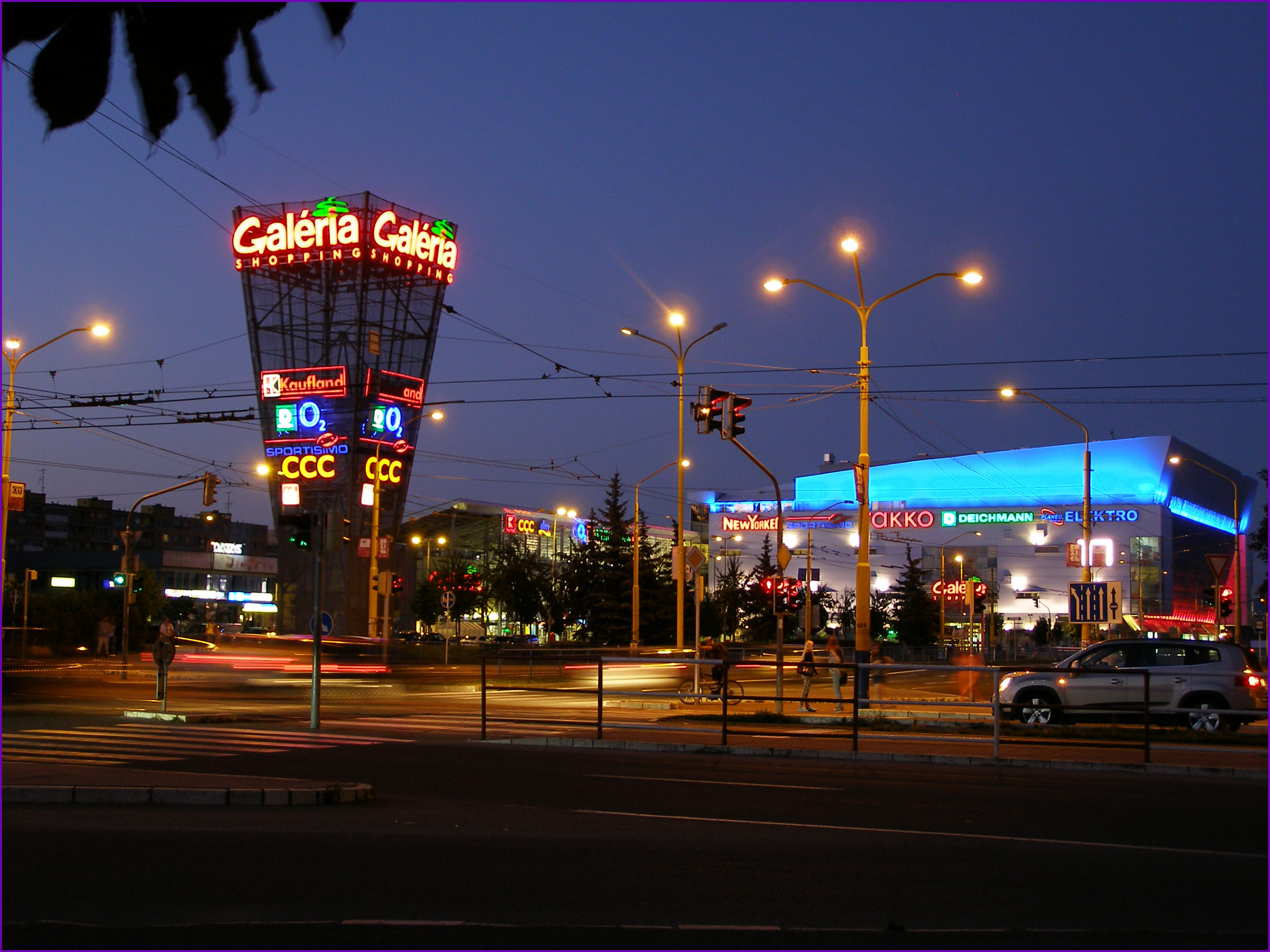 OC Galéria